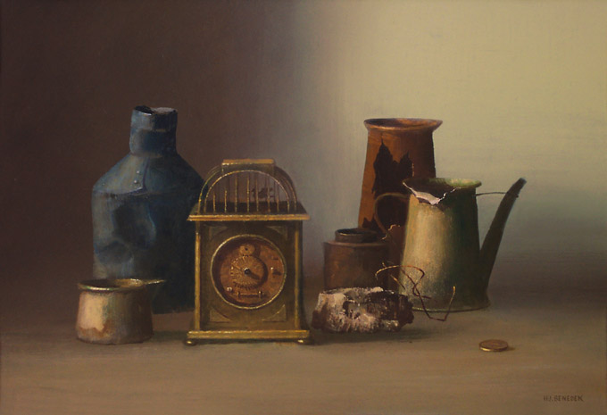 Benedek Jenő, ifj. (Csongrád, 1939. június 13.– 2019. augusztus 20.) festőművész alkotása: Öreg tárgyak, 1995, olajfestmény, 35x50 cm